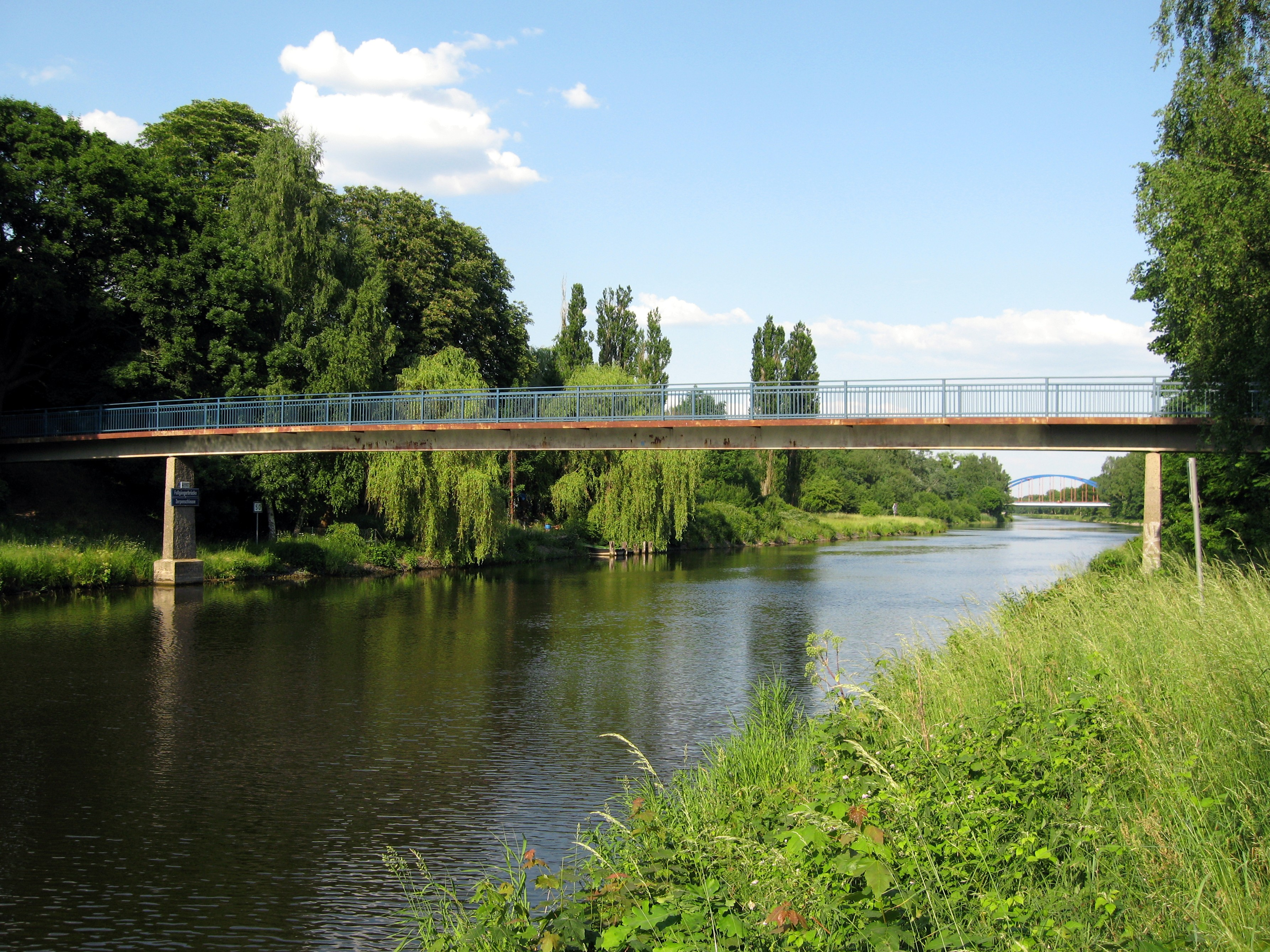 Fußgängerbrücke über den Oder-Havel-Kanal in Zerpenschleuse, Gemeinde Wandlitz, Landkreis Barnim, Land Brandenburg, Deutschland.